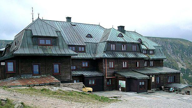 Schronisko PTTK "Strzecha Akademicka" w Karkonoszach, Mountain shelter "Strzecha Akademicka" in polish Karkonosze Mountains